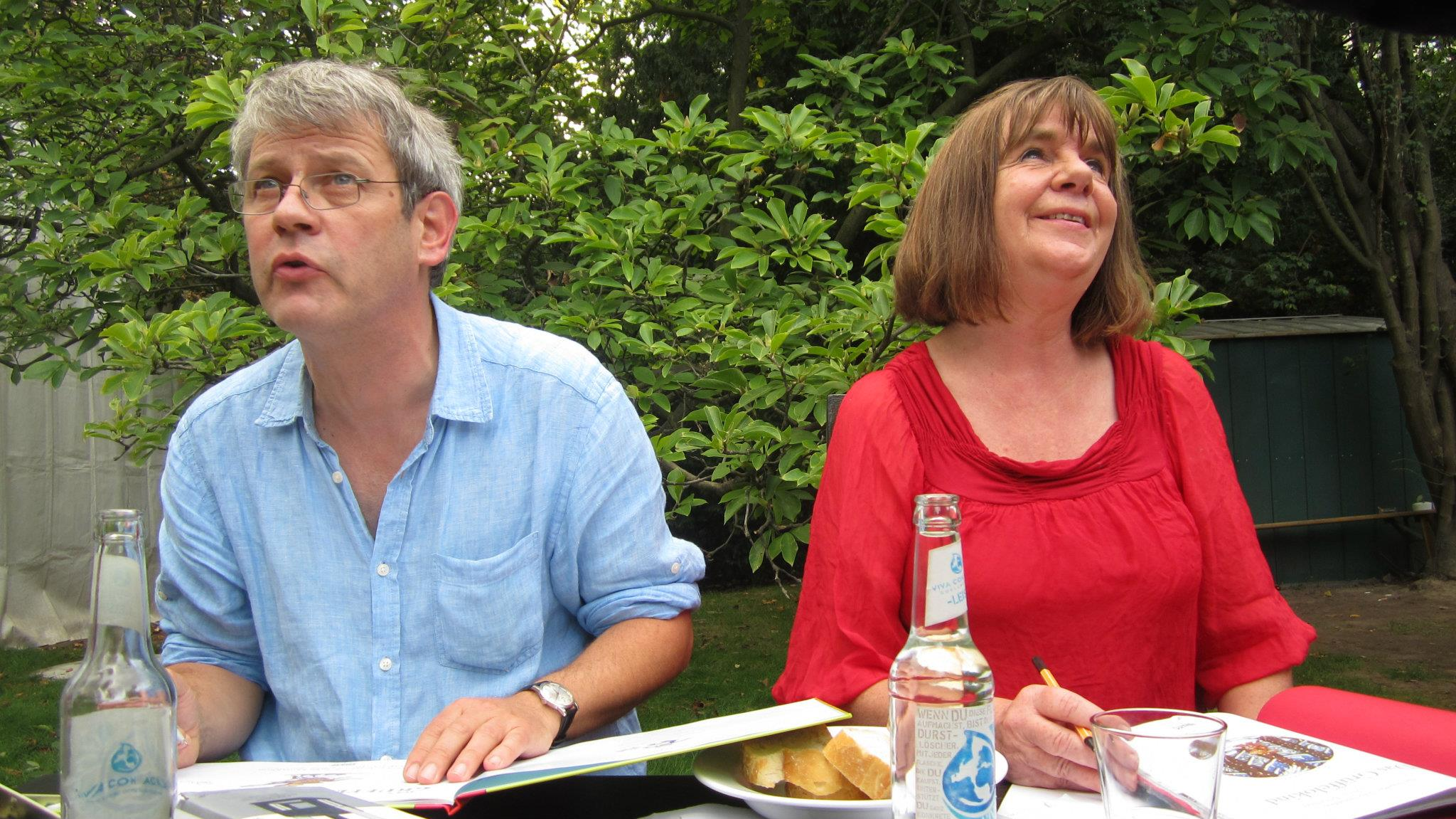 Axel Scheffler und Julia Donaldson im Rahmen des Kinder- und Jugendprogramms des 11. internationalen literaturfestivals berlin am 17.09.2011 im Garten des Hauses der Berliner Festspiele in Berlin